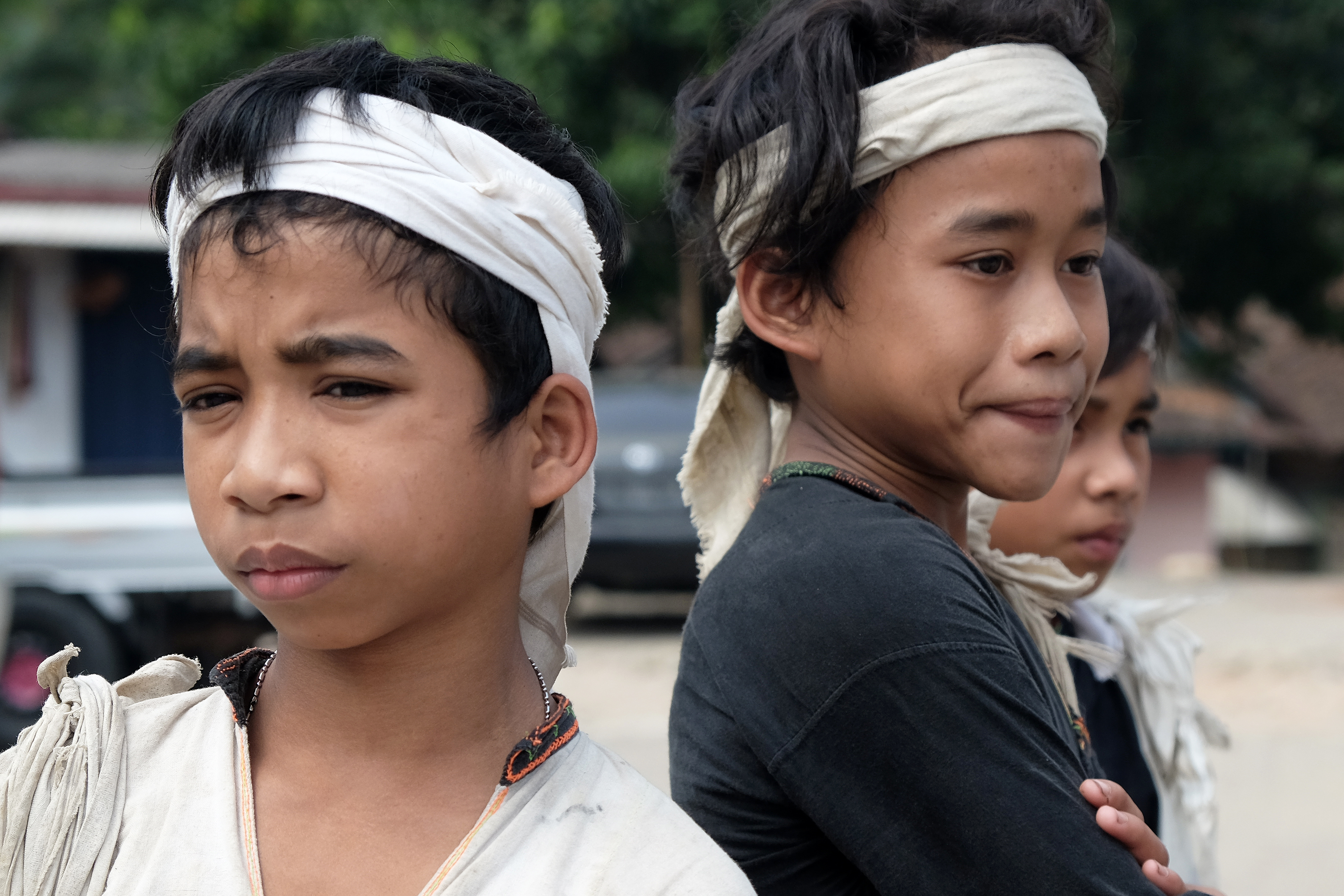 Pakaian adat suku badui dalam, baju warna putih atau hitam dengan ikat kepala yang disebut telekung